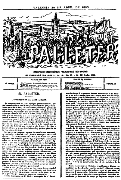 Ejemplar de la revista satírica "El Palleter" (1883)